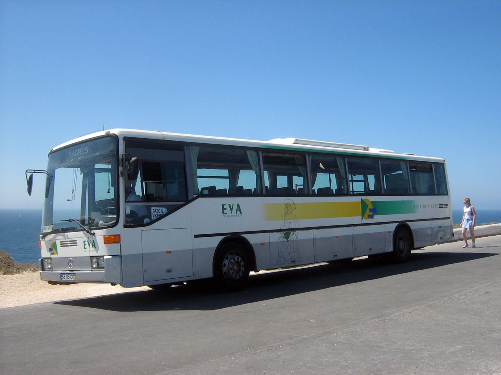 Autobús de EVA Transportes en el Cabo de San Vicente.